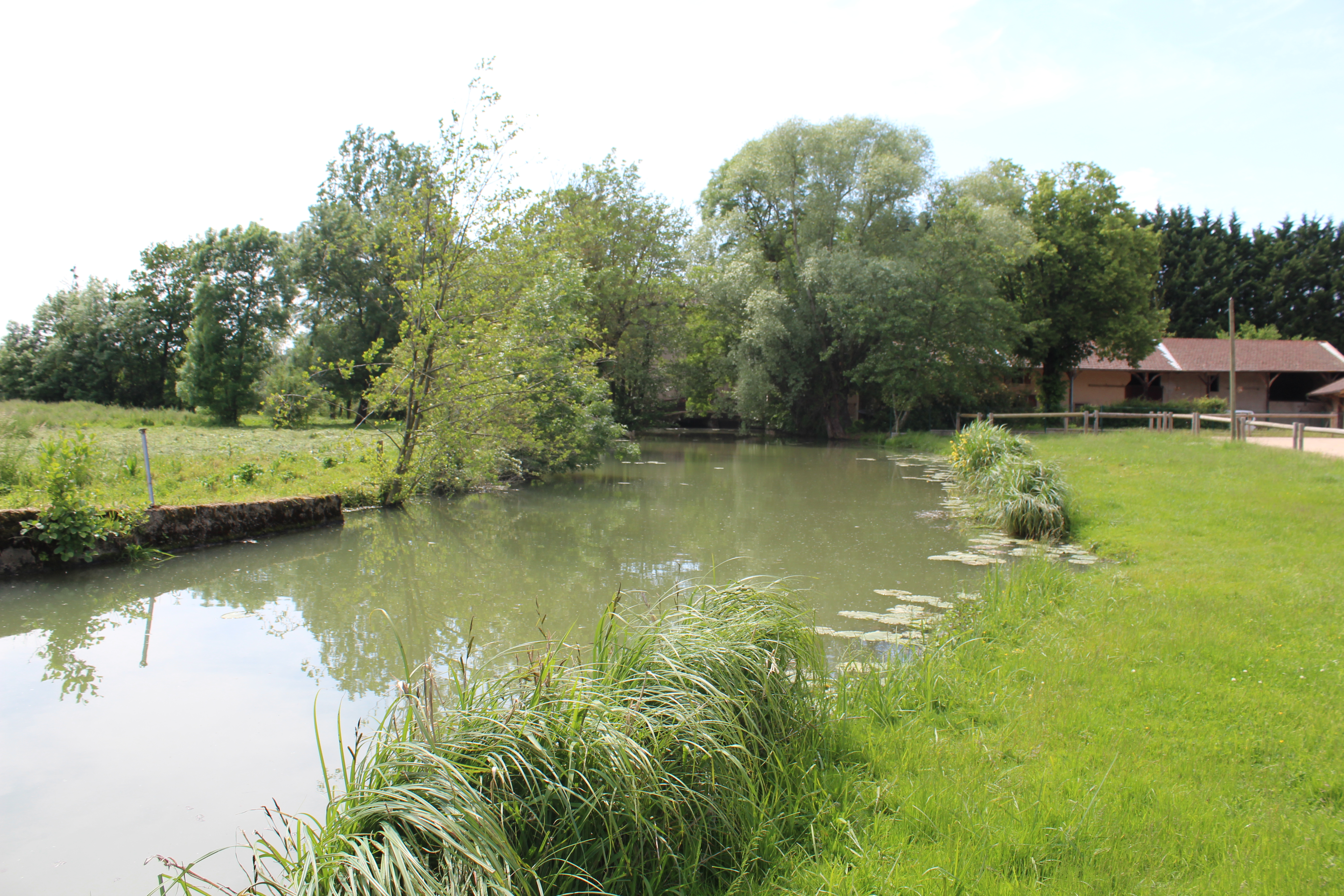 Le Menthon près du moulin de Cassevesce à Saint-Cyr-sur-Menthon.